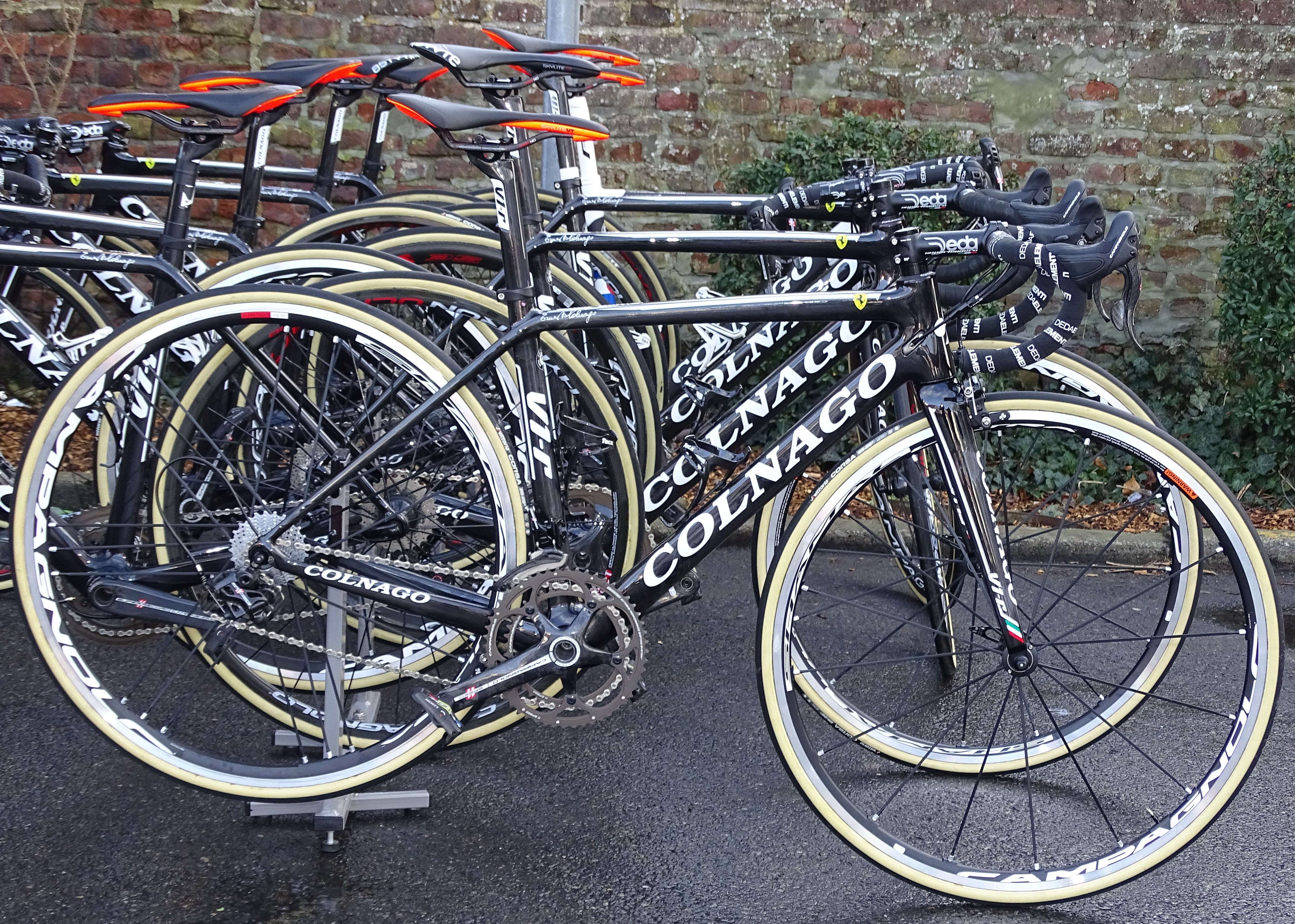 Reportage réalisé le mercredi 2 mars à l'occasion du départ du Samyn des Dames 2016 et du Samyn 2016 à Quaregnon, Belgique.